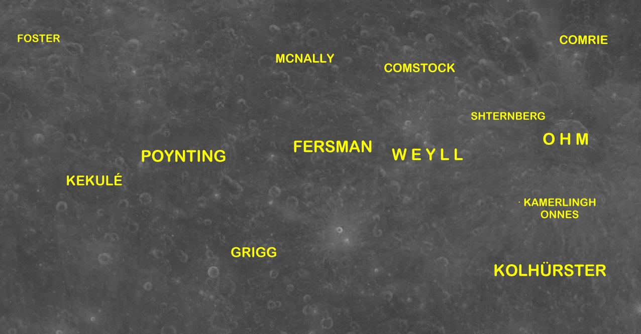 Cráter lunar Fersman. Localización. (Imagen Misión Clementine)